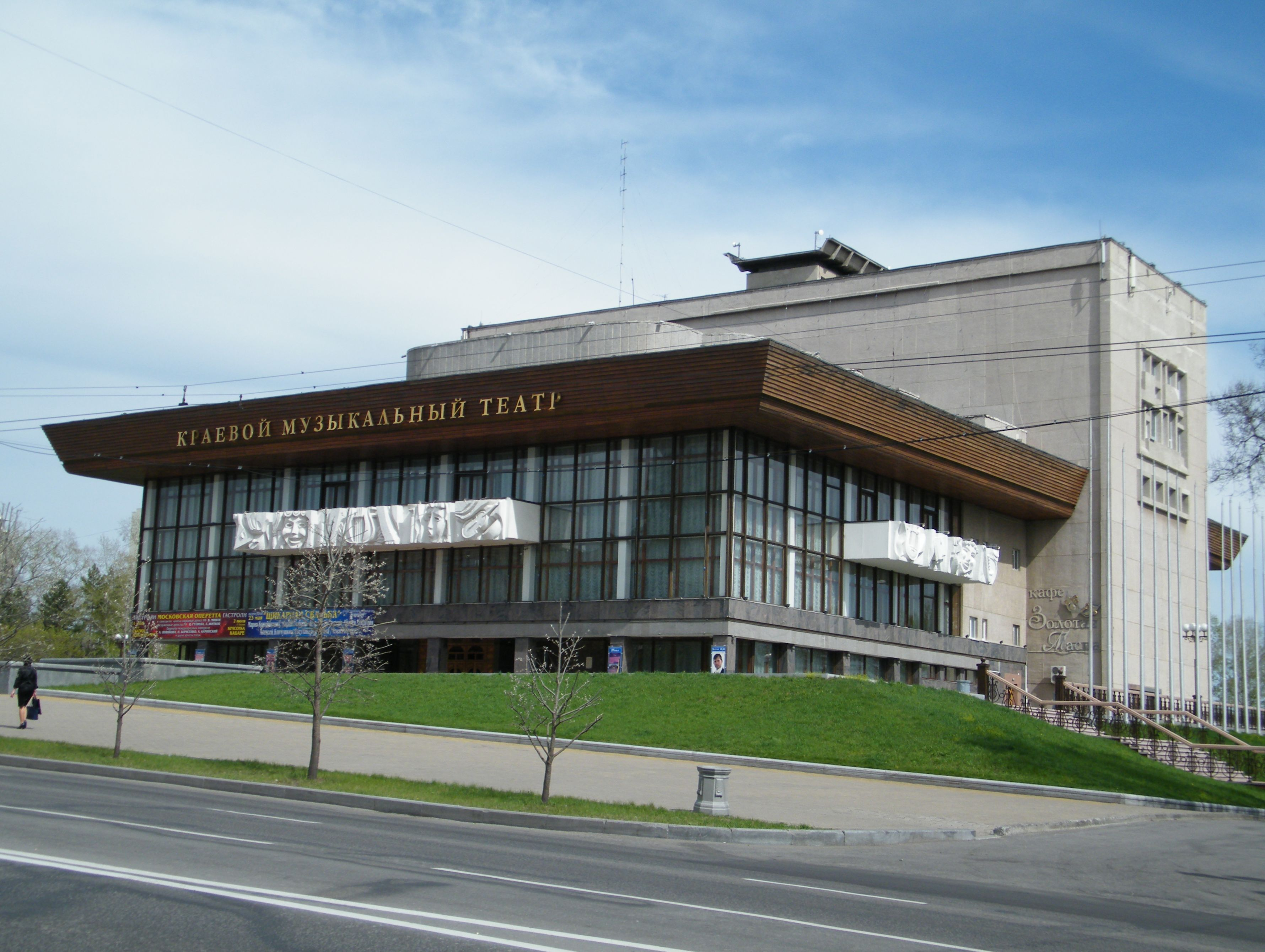 Хабаровск. Краевой музыкальный театр. (Театр музыкальной комедии)